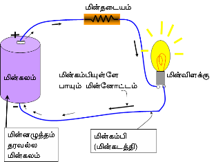 The figure was created by me, C.R.Selvakumar, and I give full permission to copy, and modify as specified in GNU Free Documentaion License and relese it into the public domain. July 12, 2006 பகுப்பு:தமிழில் விளக்க வரைபடங்கள்